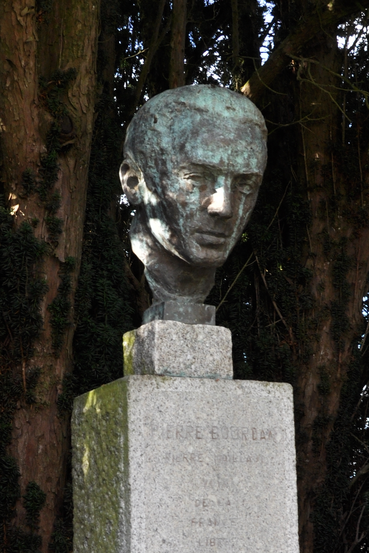 Stèle à la mémoire de pierre Jourdan au Bourg-d'Hem (Creuse)